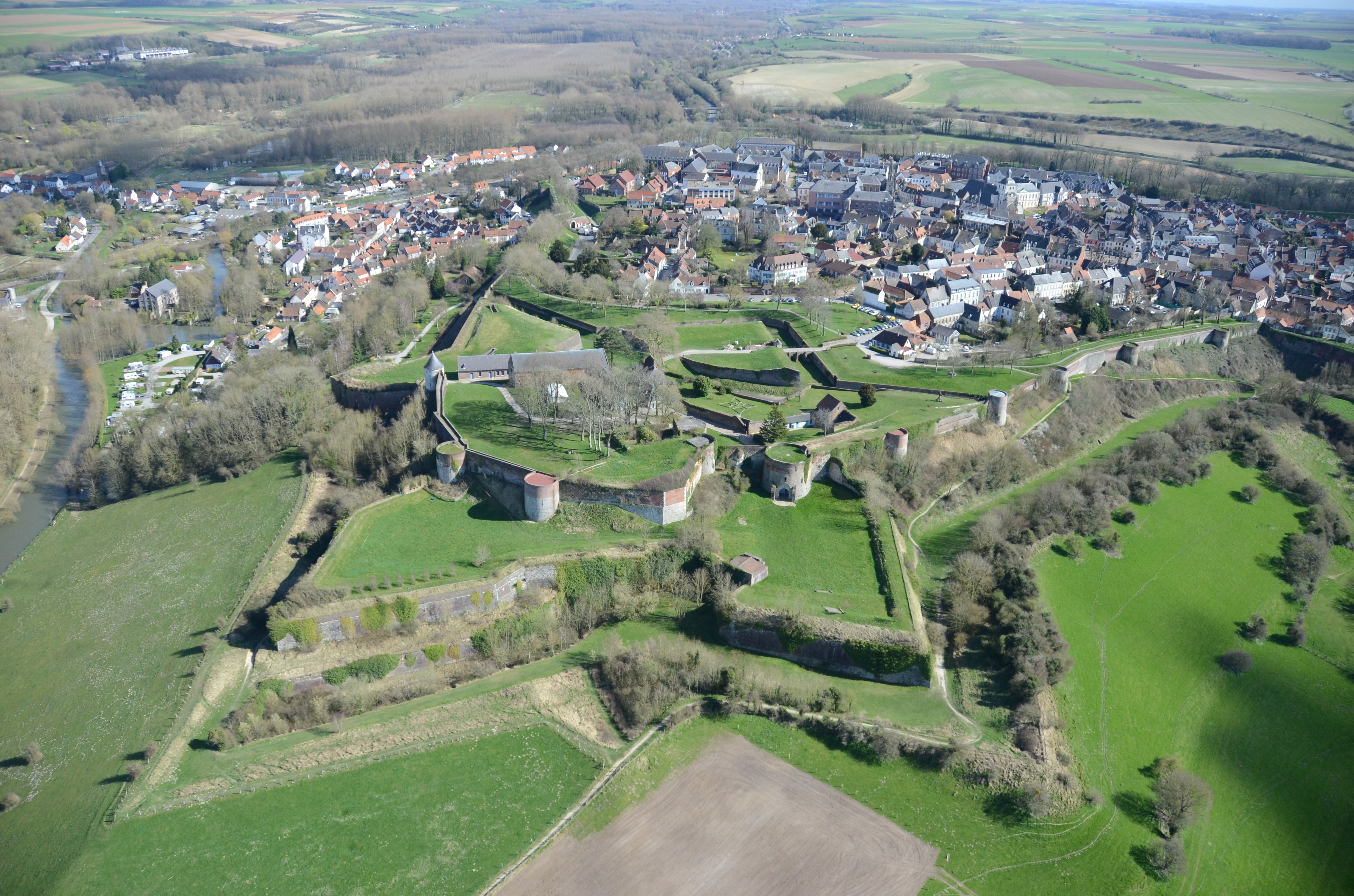 Vue aérienne de la citadelle de Montreuil-sur-Mer (Pas-de-Calais) XIIIe -XIXe siècle